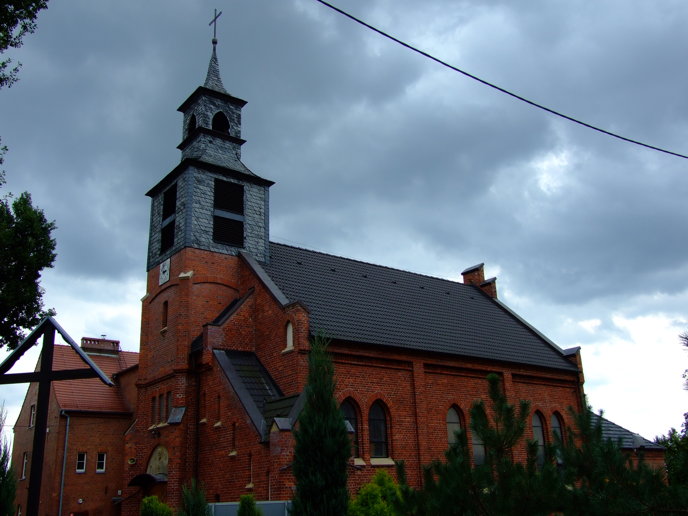 Piotrówka - kościół pw. Niepokalanego Poczęcia NMP